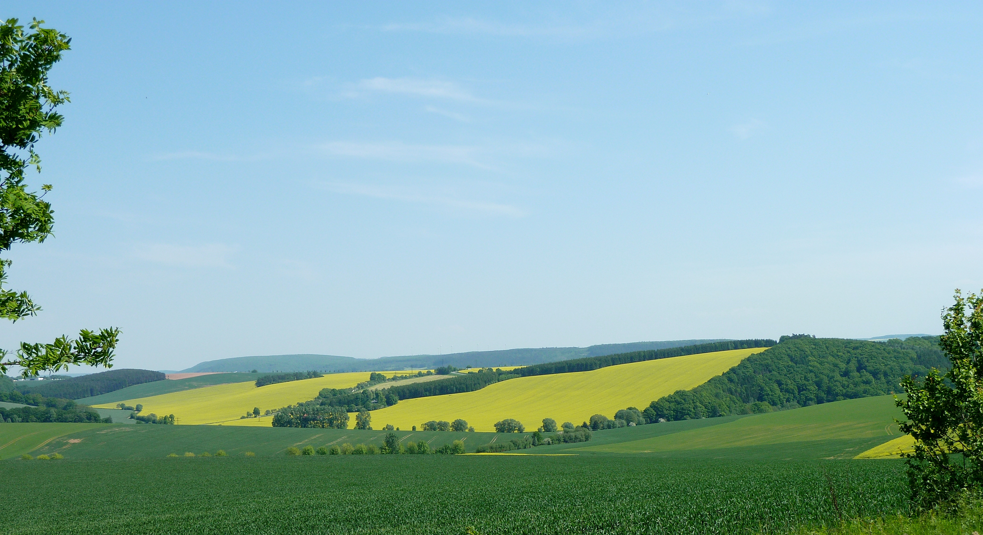 Blick vom Hohen Kreuz nach Südosten auf den Beberberg im Eichsfelder Hügelland (im Hintergrund sind Erhebungen des westlichen Dün zu sehen)